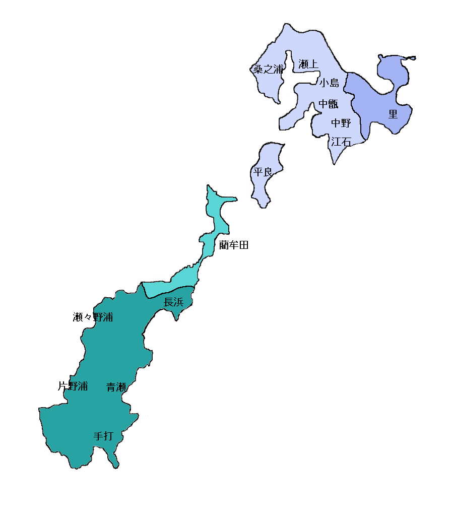 薩摩半島の西、薩摩川内市にある甑島列島の地図。薄緑色は旧鹿島村域、緑色は旧下甑村域、濃い青は旧里村域、薄い青は旧上甑村域となっている。